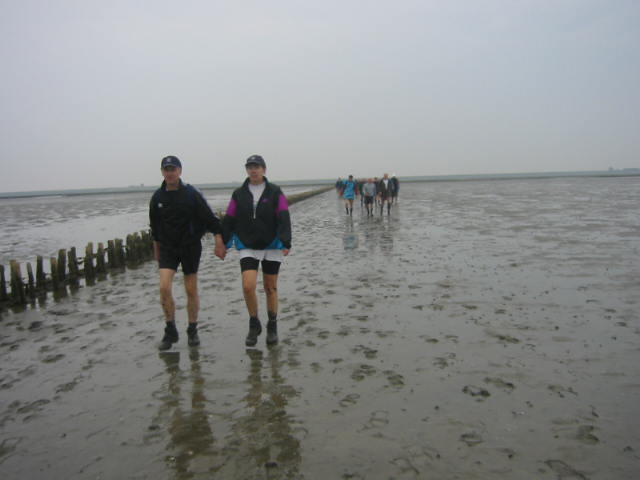 Eigen foto. Wadlopen vanuit Pieterburen. GerardM 5 mrt 2004 23:24 (CET)